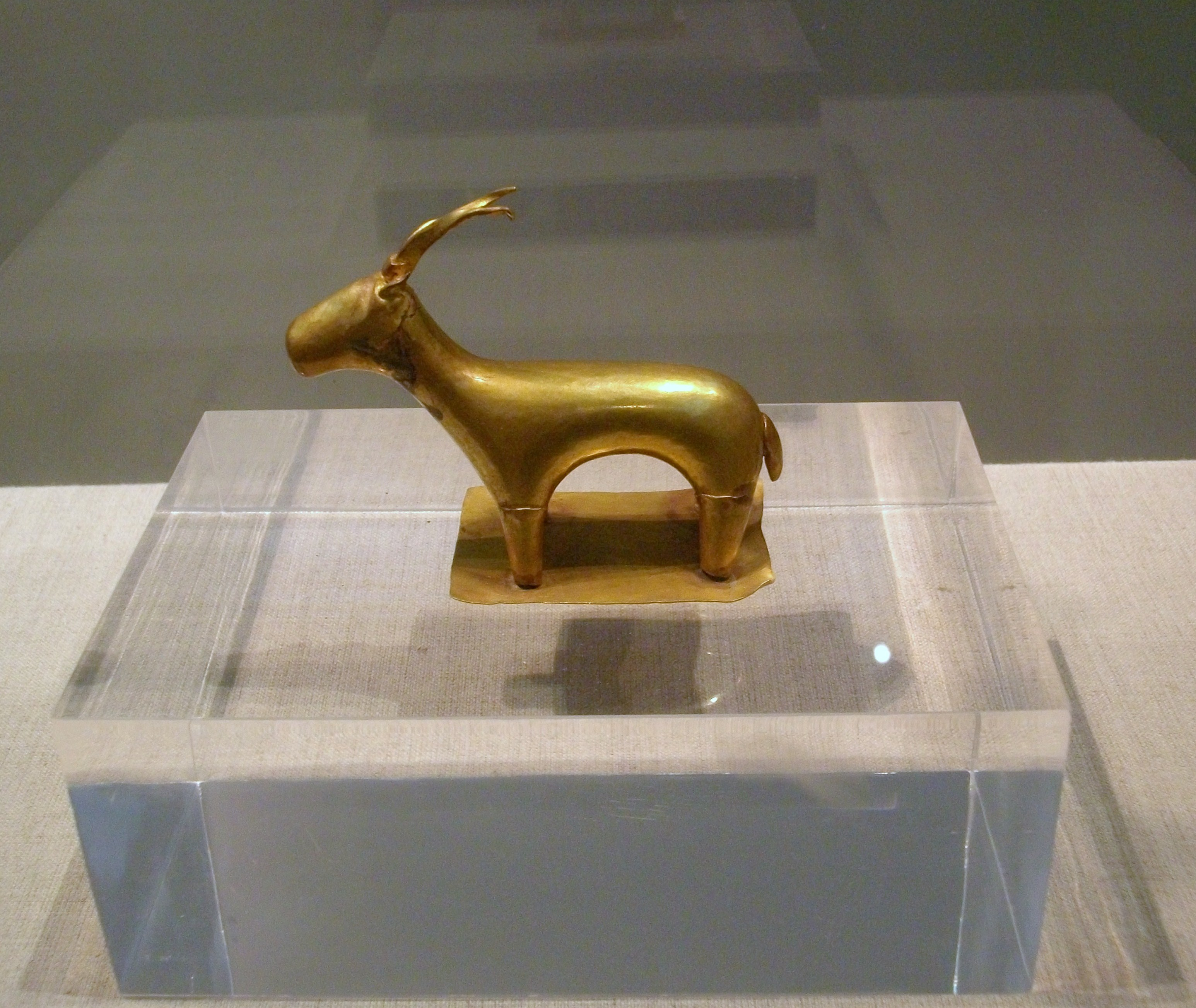 Estatueta d'or d'una cabra, Akrotiri, segle 17 aC, Museu de la Prehistòria de Thira.